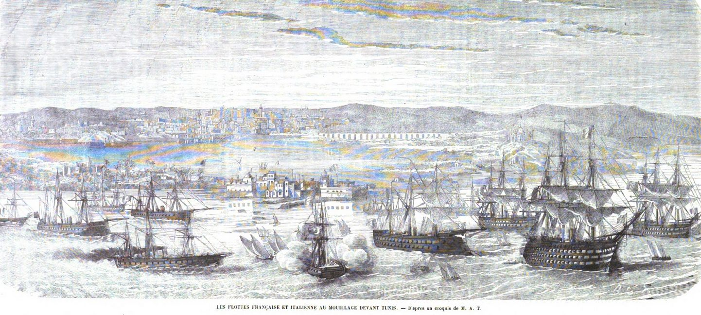 Flottes françaises et italiennes au mouillage devant Tunis pendant l'insurrection de 1864